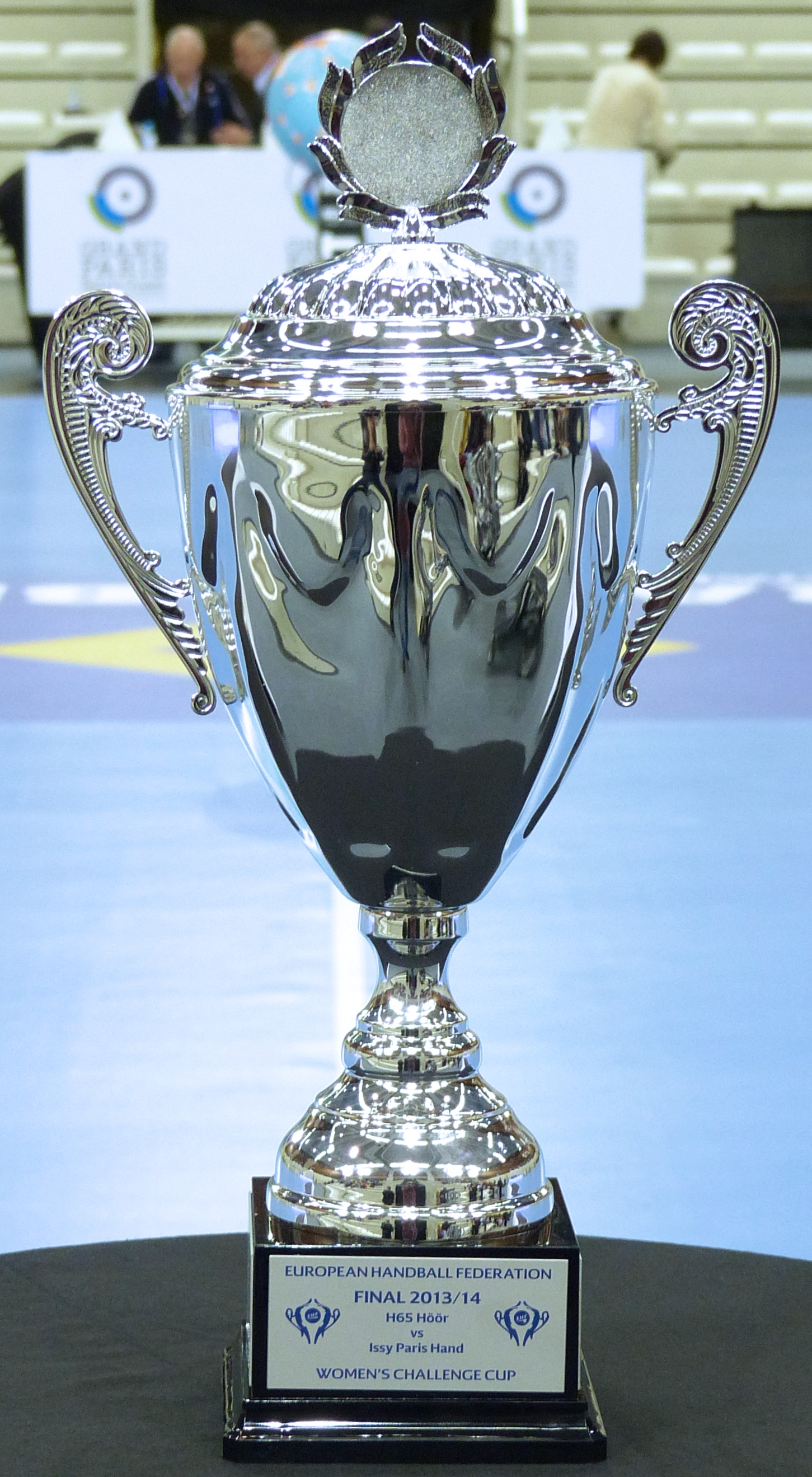 Le trophée remis à l'équipe suédoise de H 65 Höör lors de la Finale retour de la Coupe Challenge 2013-2014. Le 11 mai 2014 à Issy Les Moulineaux.